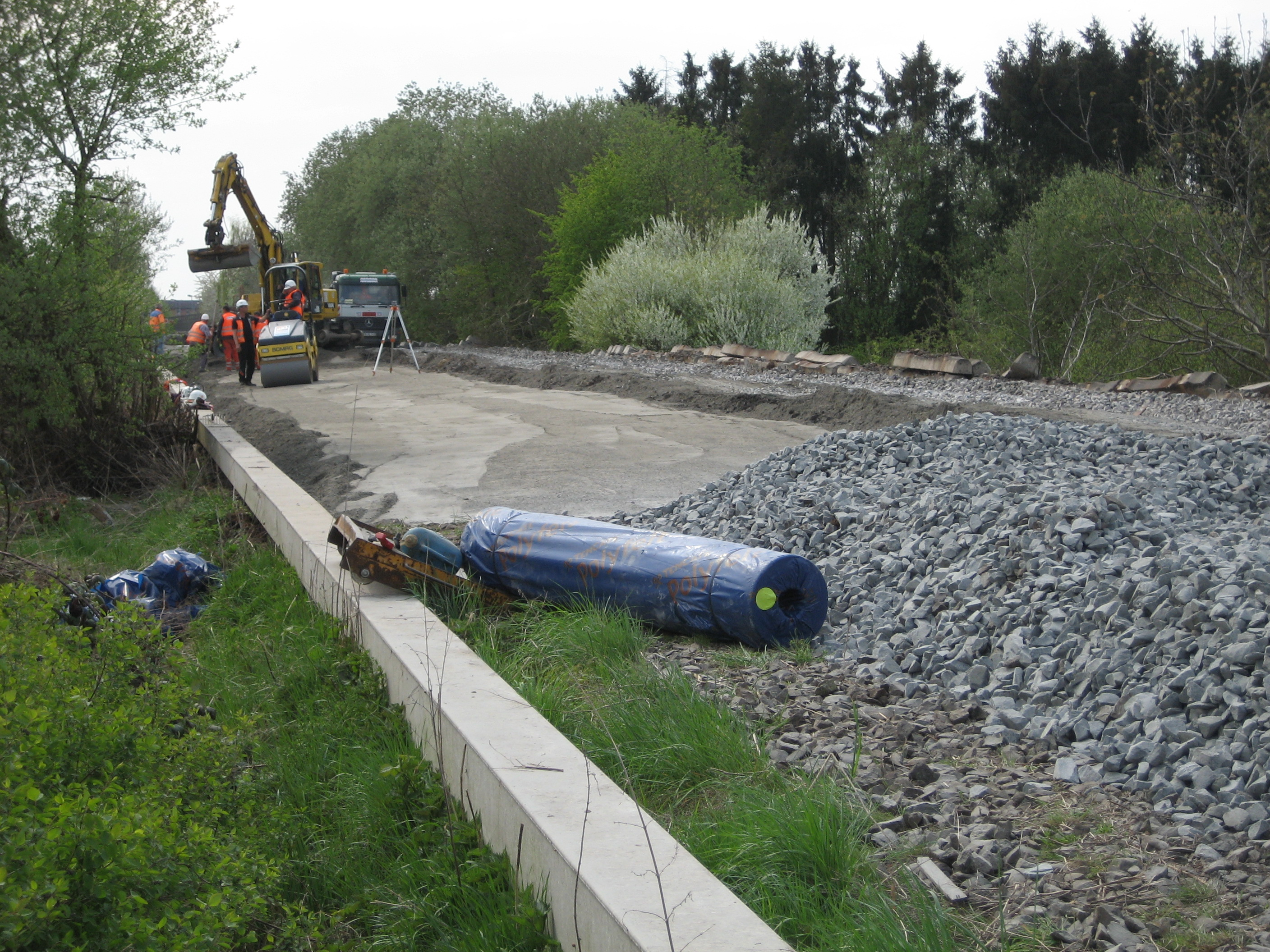 Erneuerung des Oberbaus der KBS635 bei Gießen-Rödgen